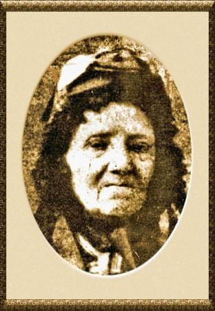 Jeanne Deroin (1805-1894), socialiste et féministe française, photo